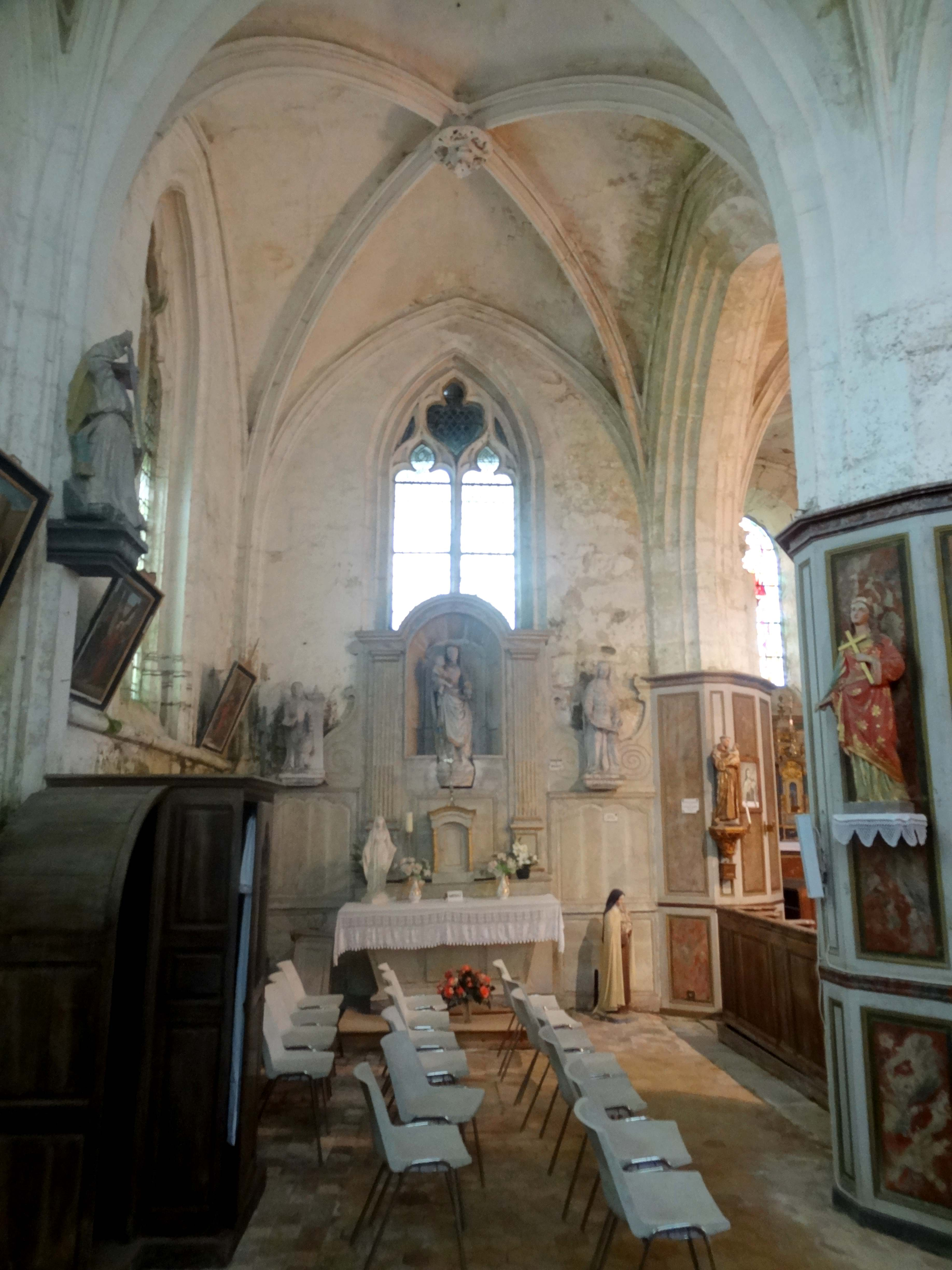 Intérieur de l'église - voir titre.